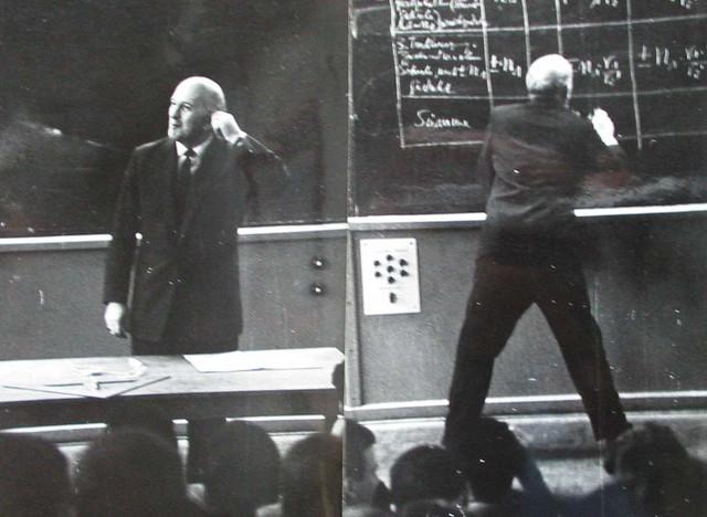 Siegfried Hildebrand - ich habe ihn 1968 in der Vorlesung Feinwerktechnik fotografiert